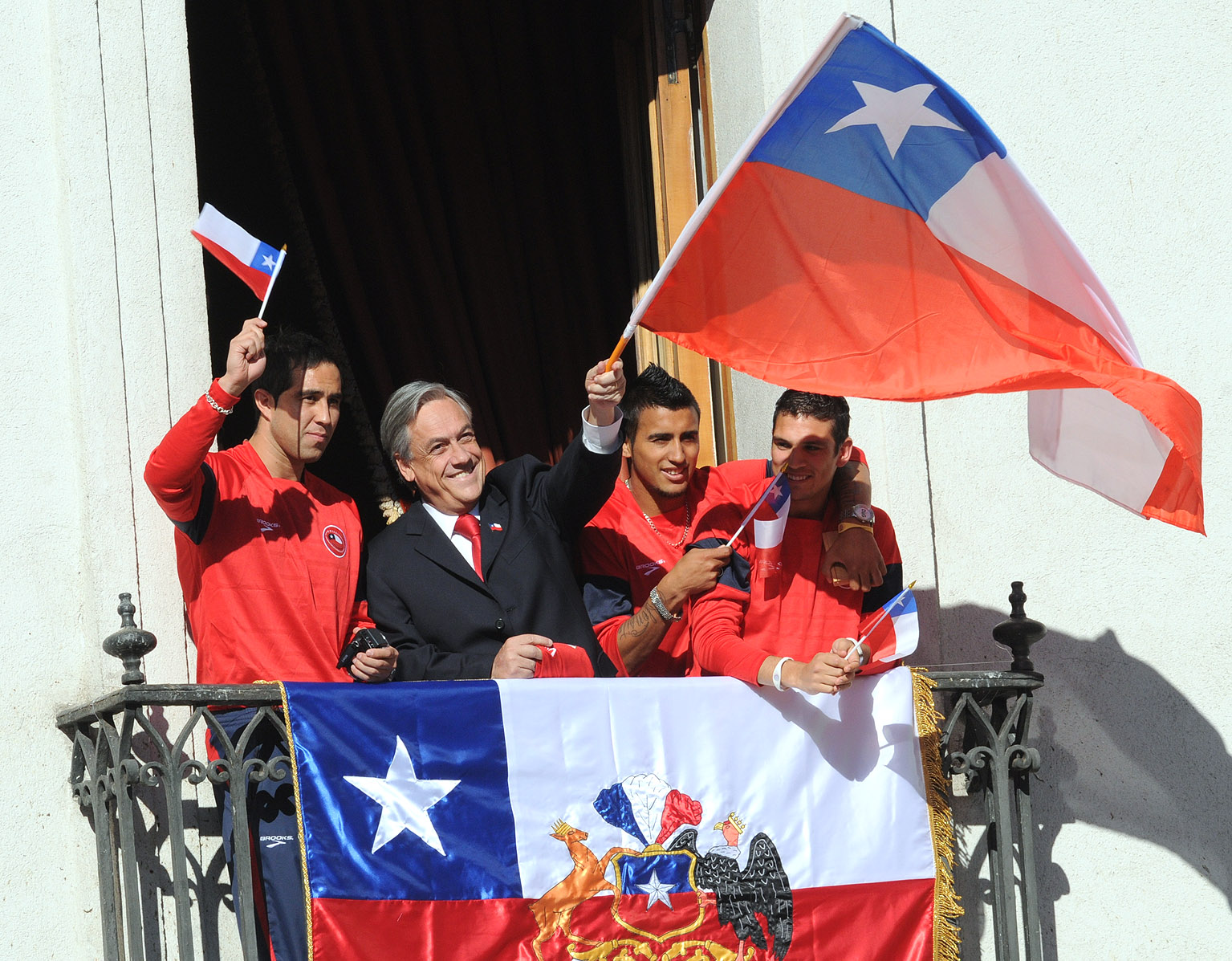 El Presidente de la República recibió a los jugadores, cuerpo técnico y dirigentes de la Selección Chilena de Fútbol que participó en el Mundial de Sudáfrica 2010.